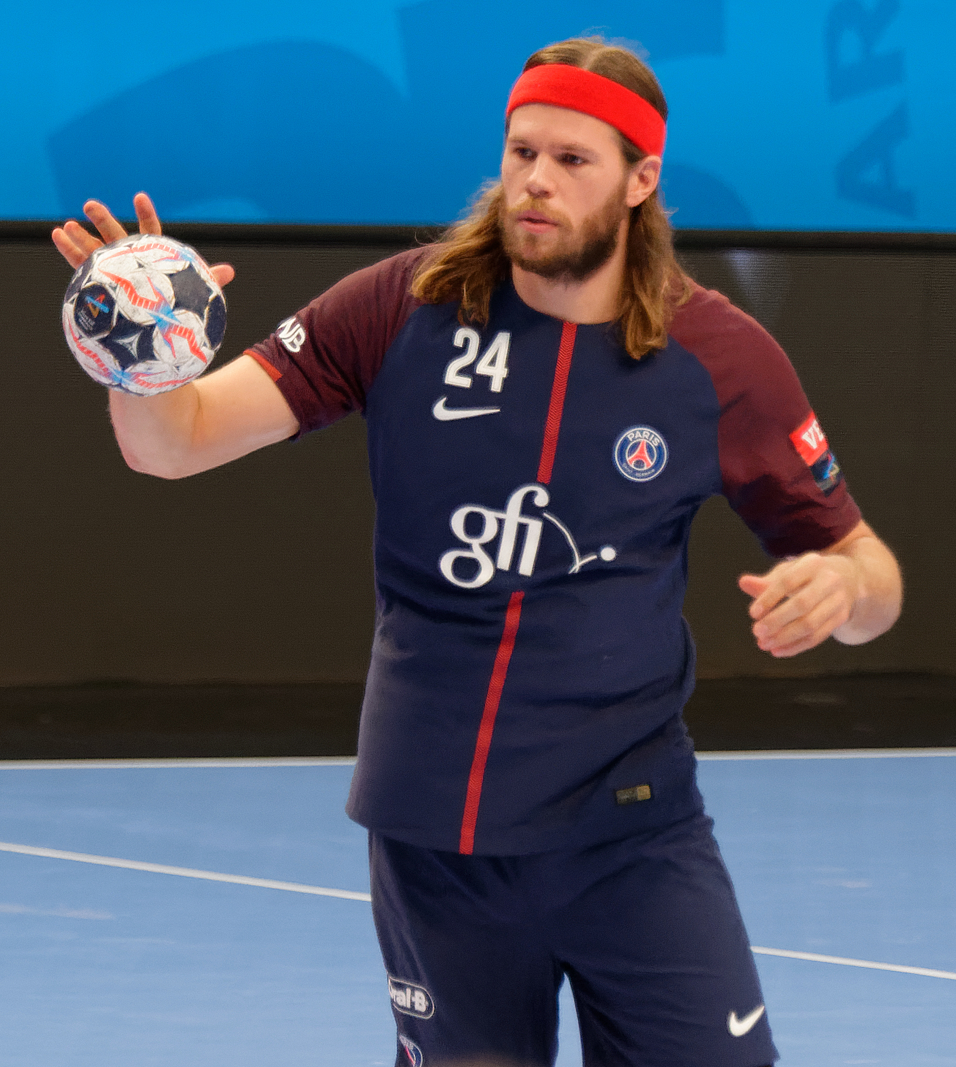 Match entre le PSG Handball et Meshkov Brest. A Coubertin, le 24 septembre 2017.